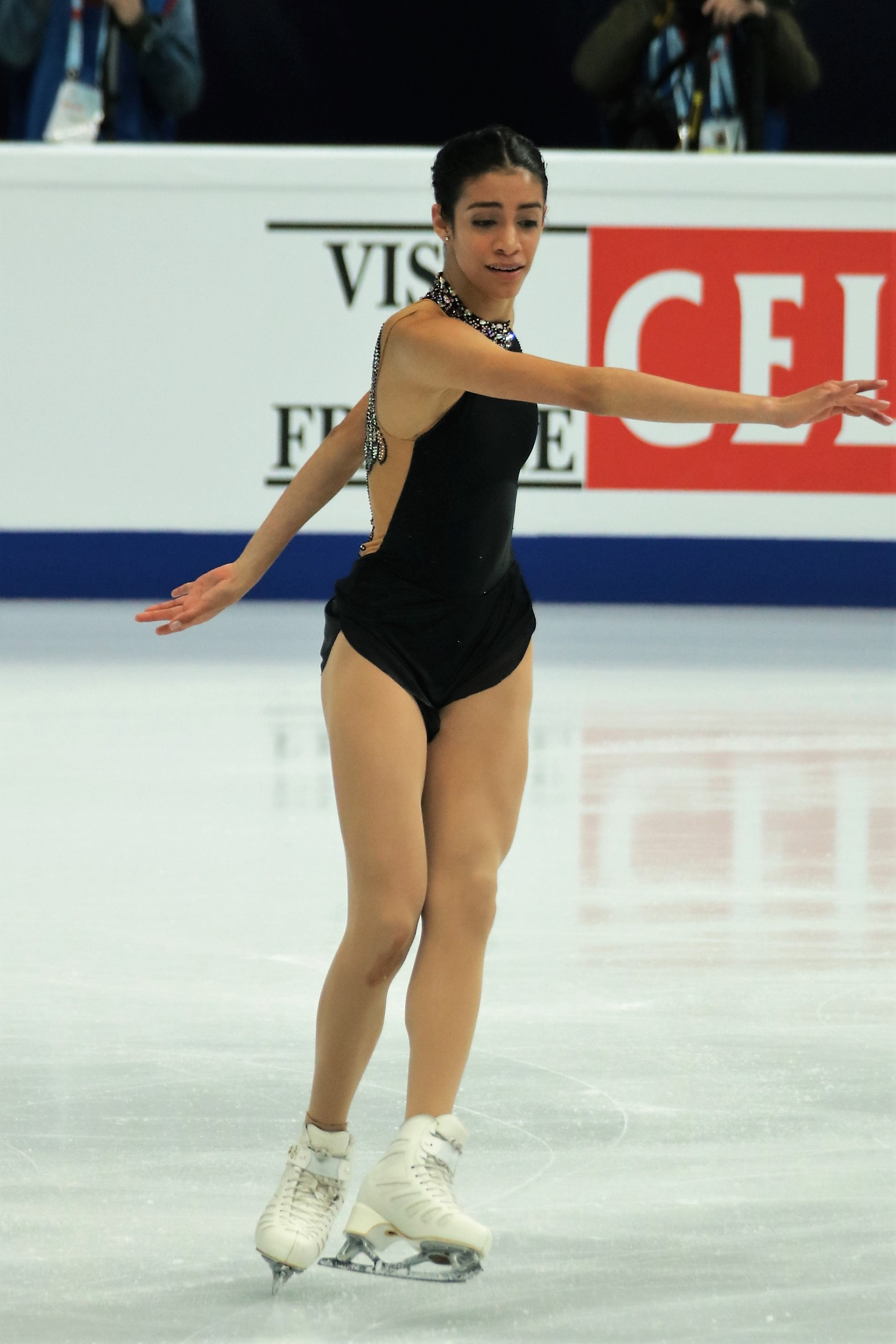 Валентина Матос (Испания) на Чемпионате Европы по фигурному катанию 2018